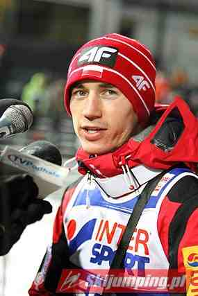 Kamil Stoch during saturday competition of FIS Ski Jumping World Cup in Zakopane, 2012